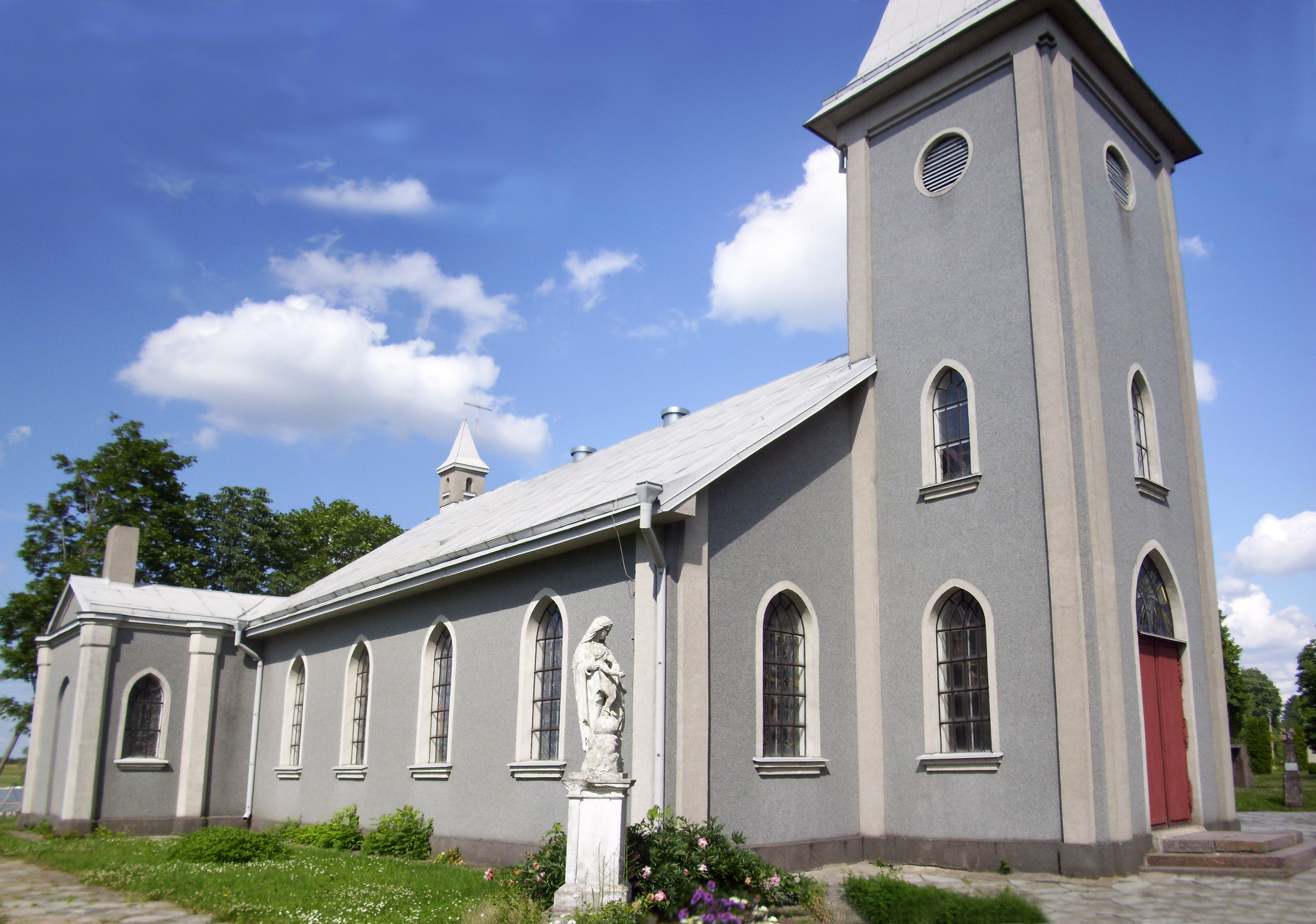 Šaukėnų Švč. Trejybės bažnyčia